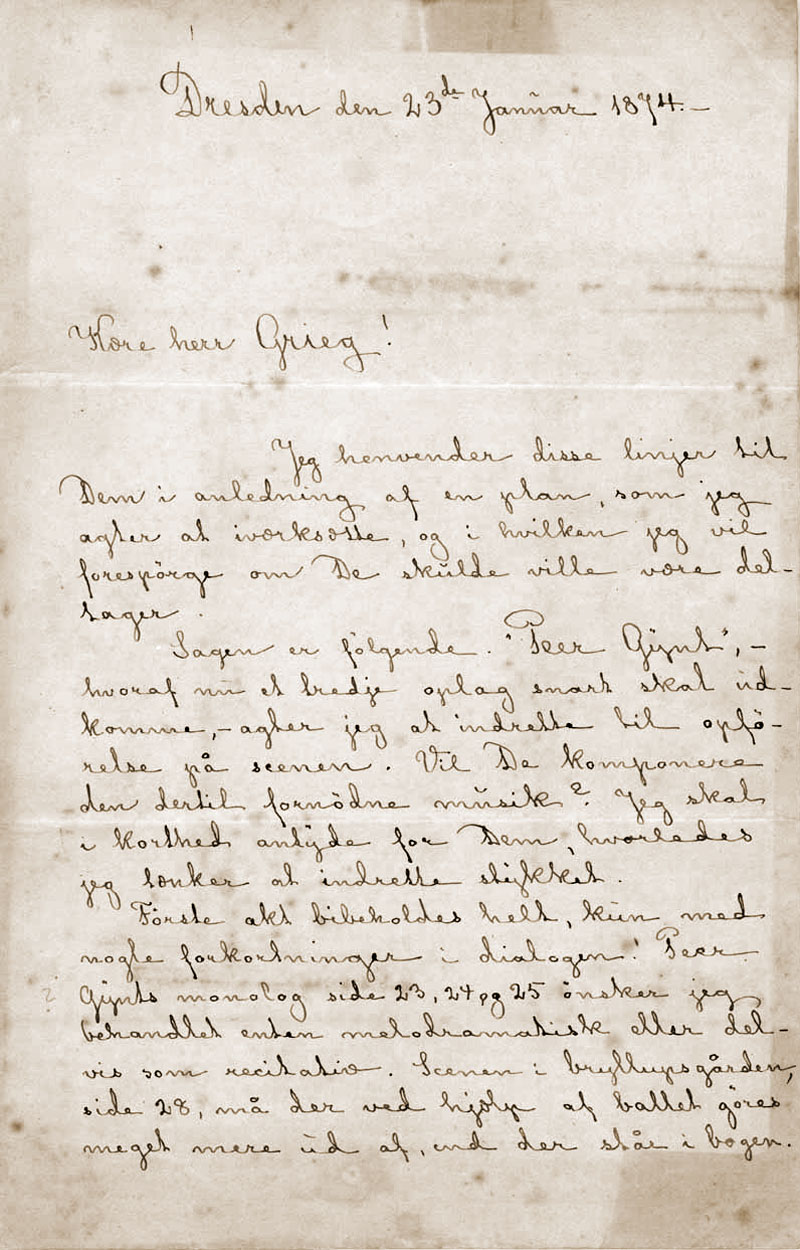 Erste Seite des Briefs Henrik Ibsens aus Dresden an Edvard Grieg vom 23. Januar 1874